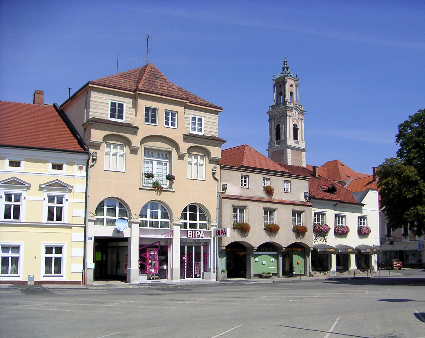 Zentrum von Herzogenburg in Niederösterreich(Gebäude von links: Rathausplatz 10 (abgeschnitten), 11, 12 und 13)